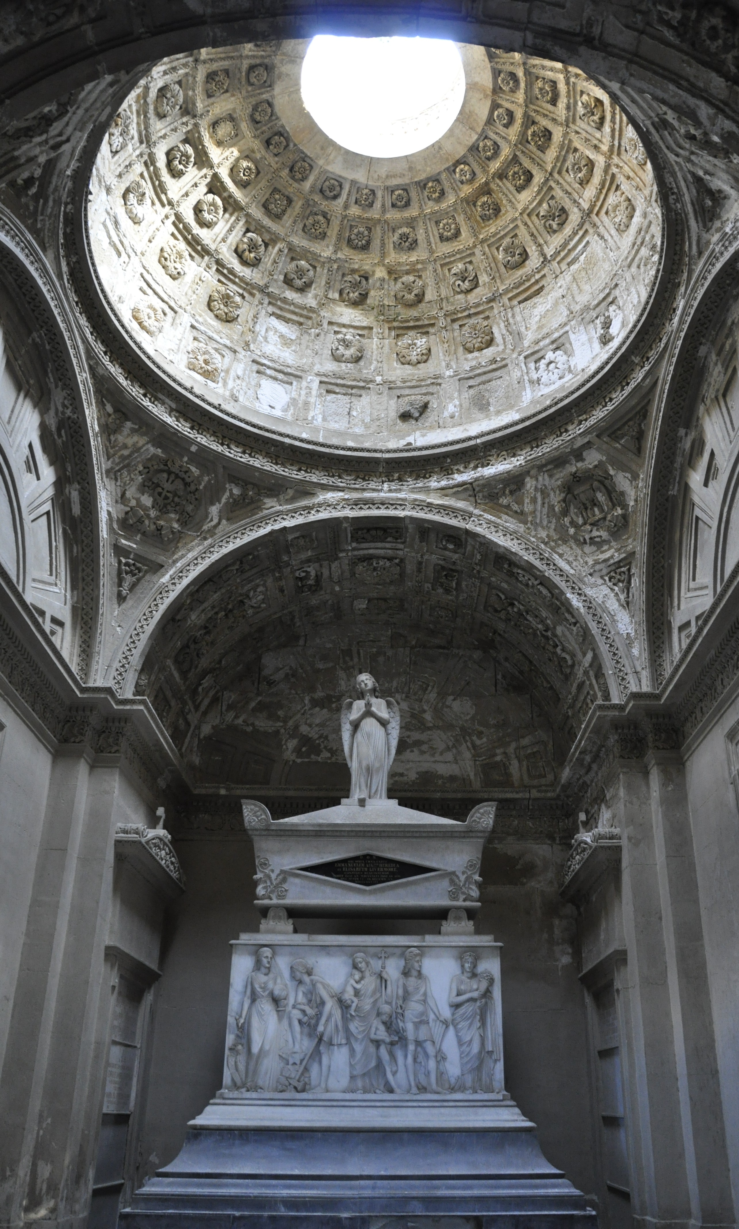 Interior del panteón Heredia. Monumento funerario diseñado por el escultor neoclásico italiano Lorenzo Bartolini.